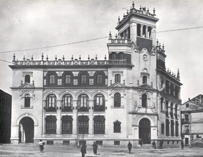 Palacio de Correos de Valladolid en la década de 1920